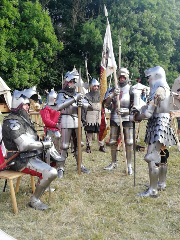 Reconstitution de chevaliers et d'hommes d'armes semblables à ceux ayant combattu sur le champ de bataille d'Azincourt (association "Genz d'armes 1415").